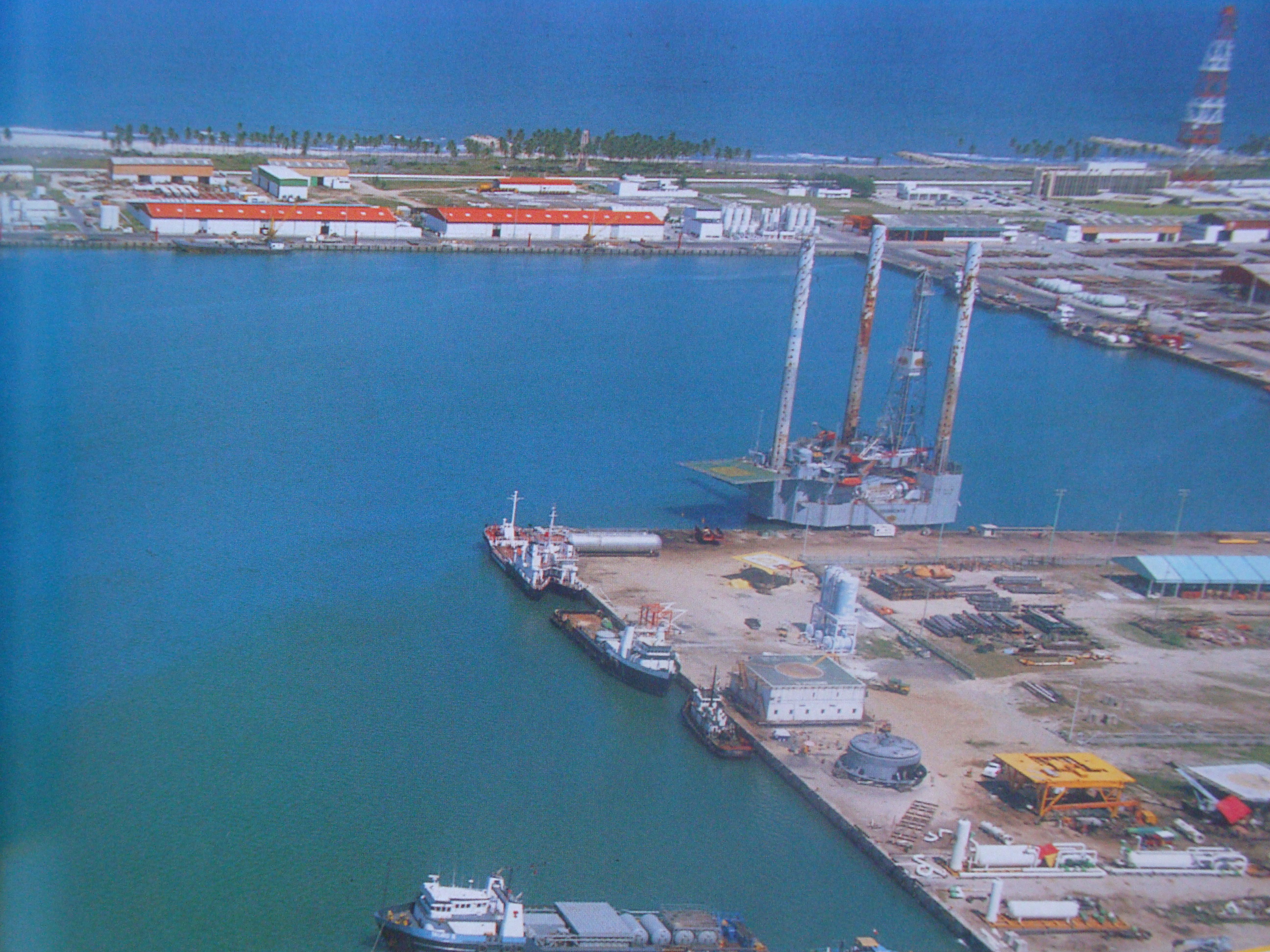 Vista aerea de la terminal de abastecimiento del puerto de Dos Bocas, en el estado mexicano de Tabasco.